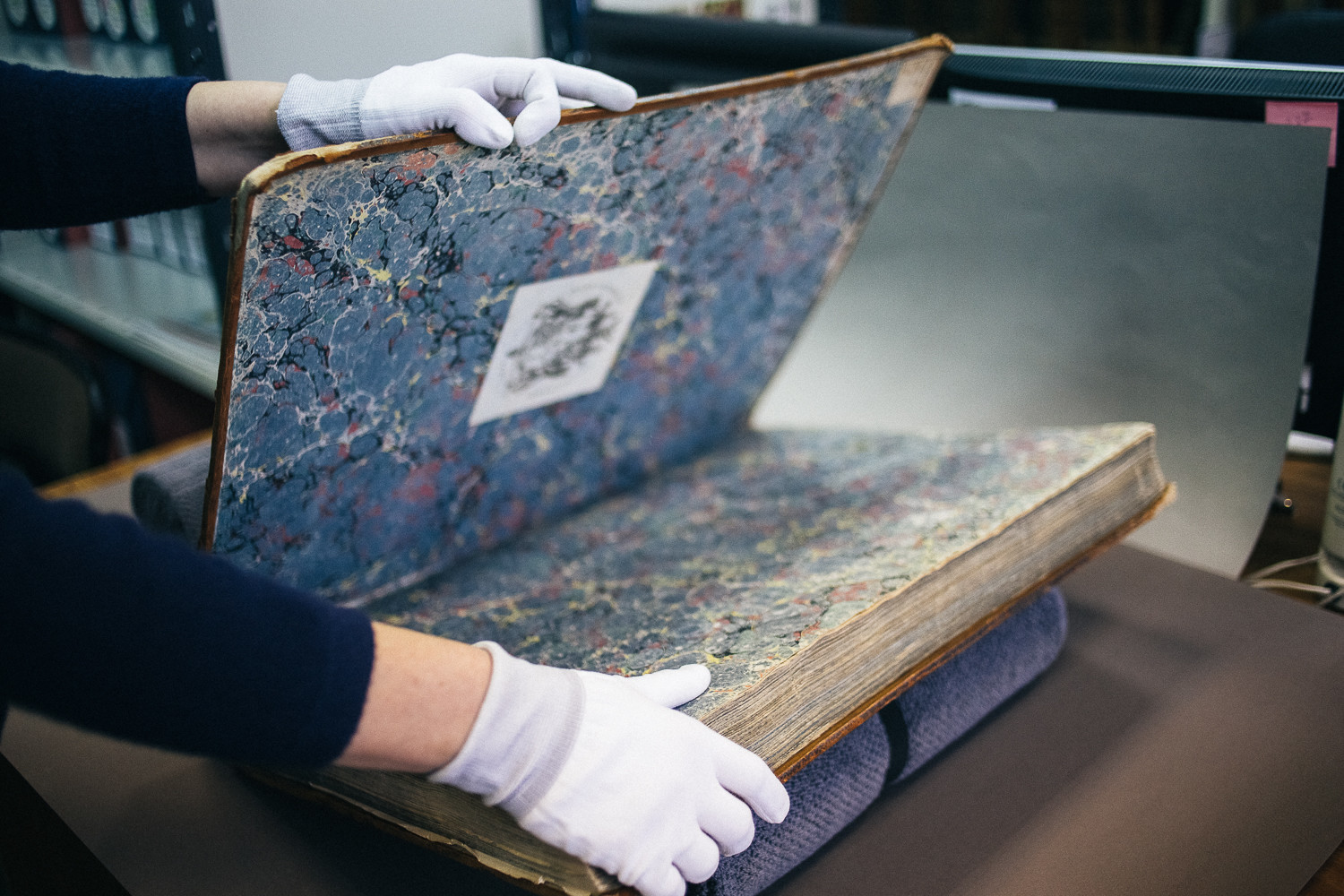 Государственное бюджетное учреждение культуры г. Москвы «Центральная универсальная научная библиотека имени Н.А. Некрасова» Главное здание Библиотеки им. Н.А. Некрасова 105005, Москва, ул. Бауманская, д. 58/25, стр. 14 (м. «Бауманская»)